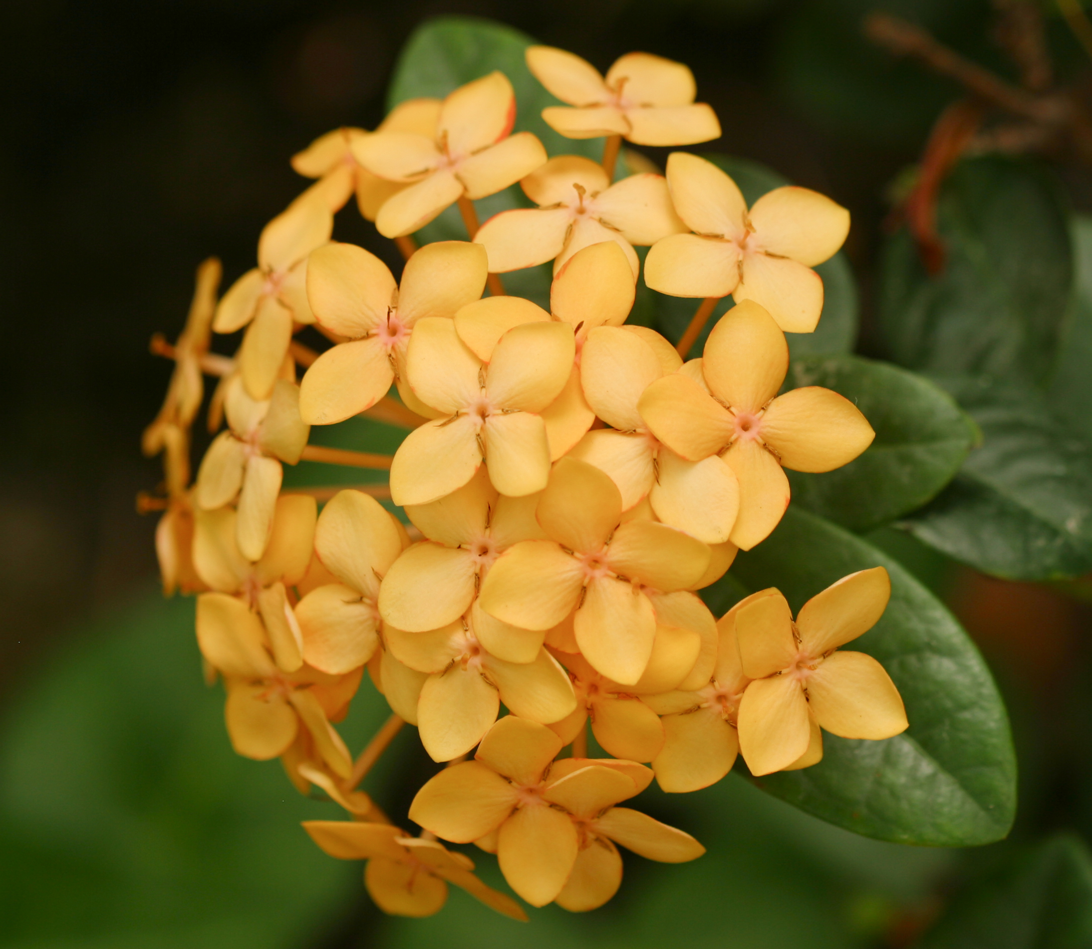 Jungle Geranium (Ixora) of cultivar "Maui Sunset"